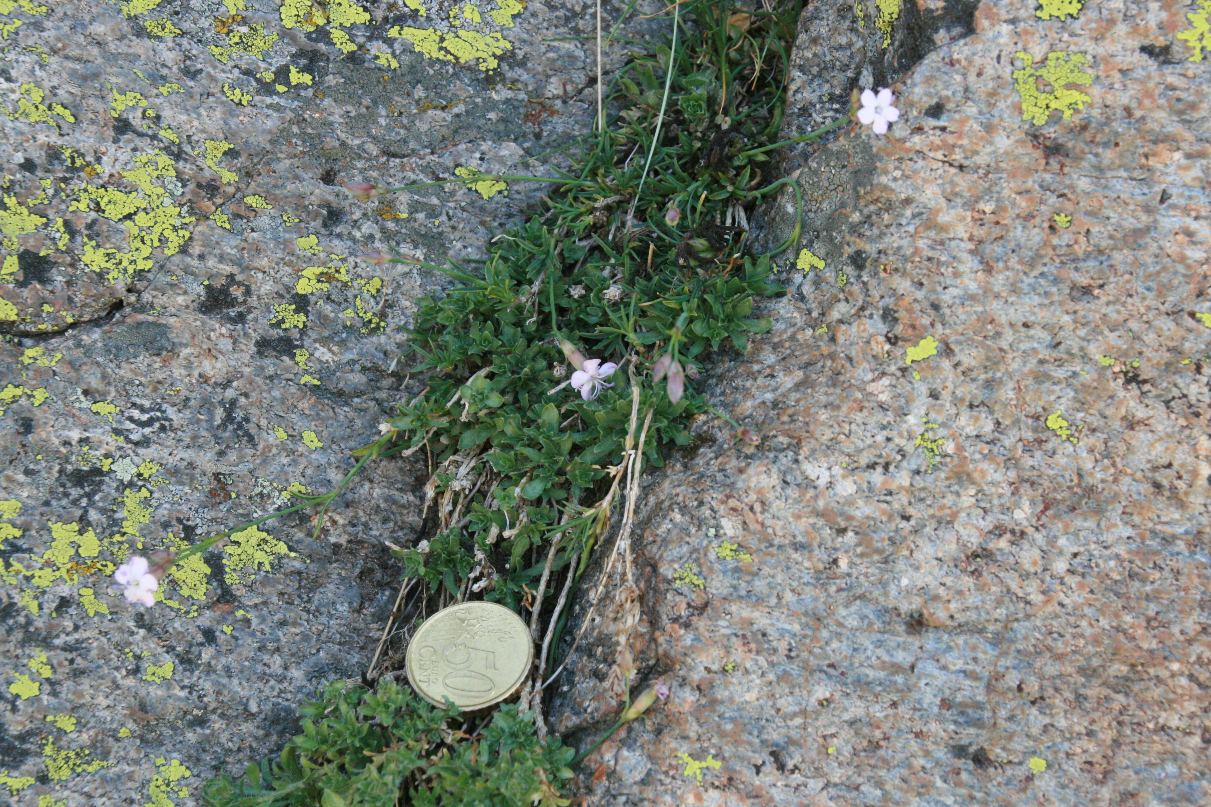 Flora en las inmediaciones de la Laguna Grande del Circo de Gredos en la Sierra de Gredos. España